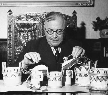 Dimitrie Gusti